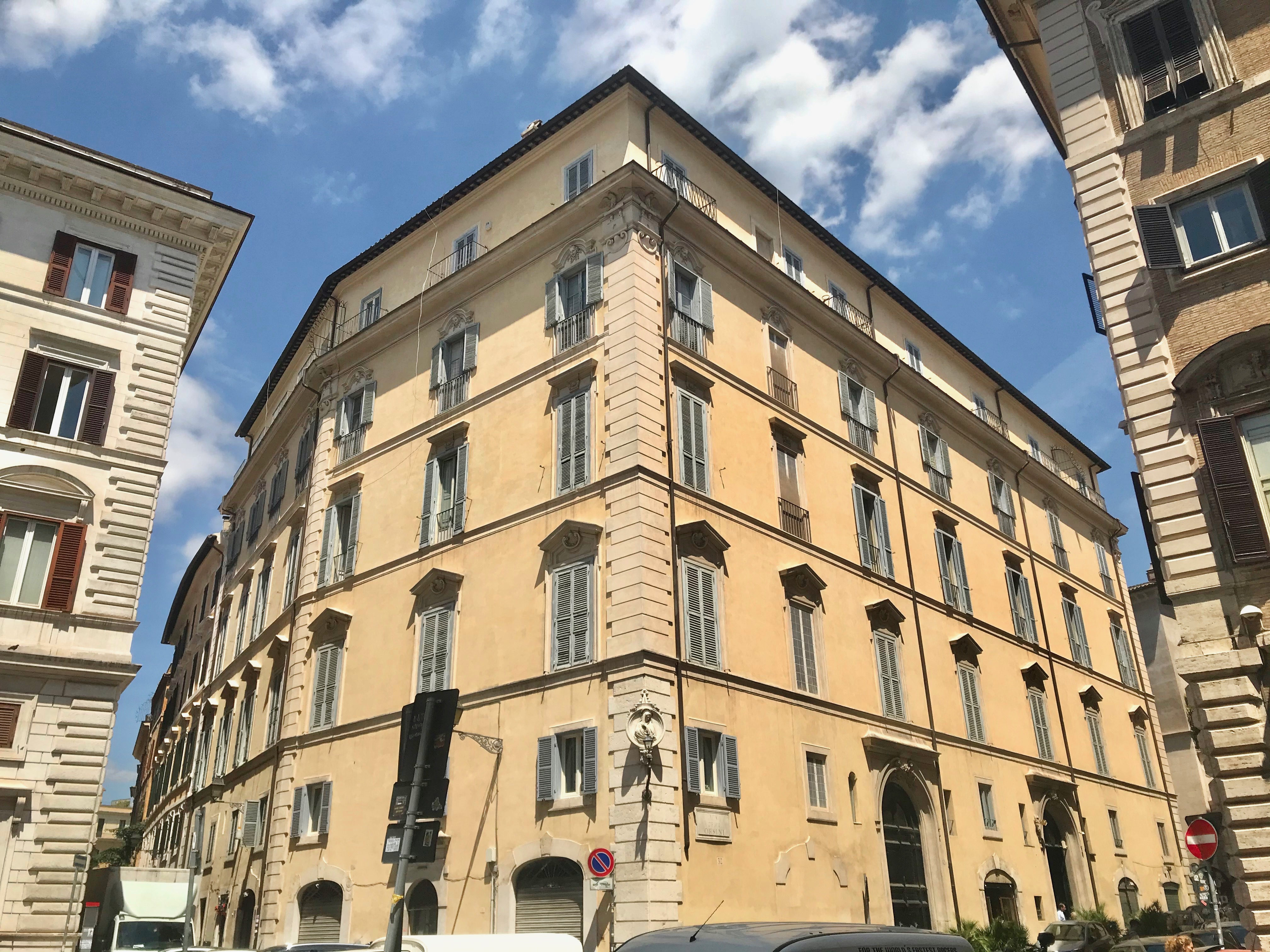 Palazzo Capponi Stampa visto da Piazza dell'Orologio